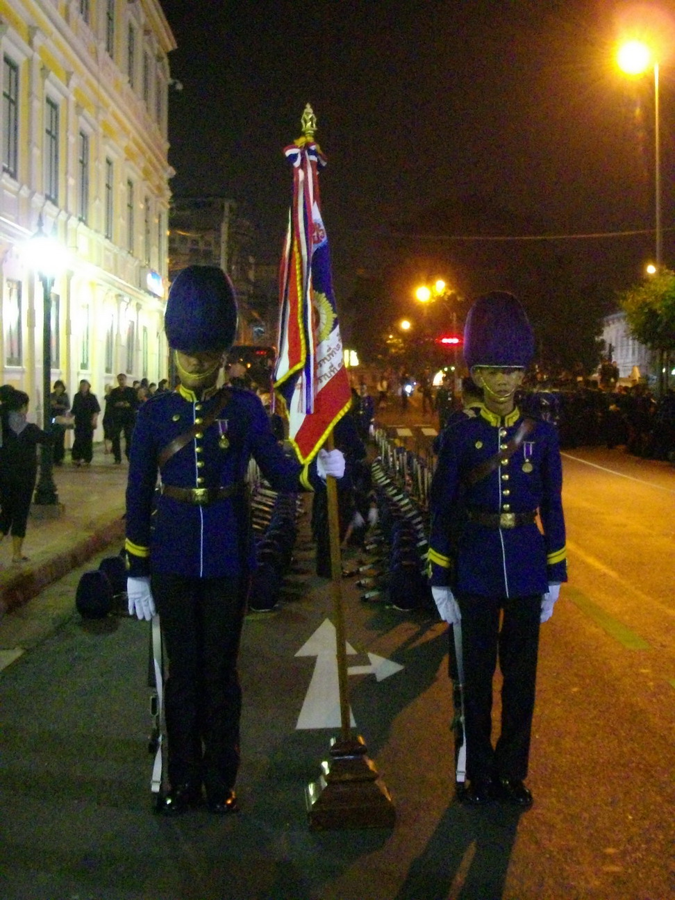 หมู่เชิญธงชัยเฉลิมพลของกองพันทหารราบที่ 2 กรมทหารราบที่ 11 รักษาพระองค์ ก่อนเข้าริ้วกระบวนเชิญพระศพสมเด็จพระเจ้าพี่นางเธอ เจ้าฟ้ากัลยานิวัฒนา กรมหลวงนราธิวาสราชนครินทร์ วันที่ 15 พฤศจิกายน พ.ศ. 2551 (ถ่ายขณะตั้งแถวทหารที่ถนนกัลยาณไมตรี)